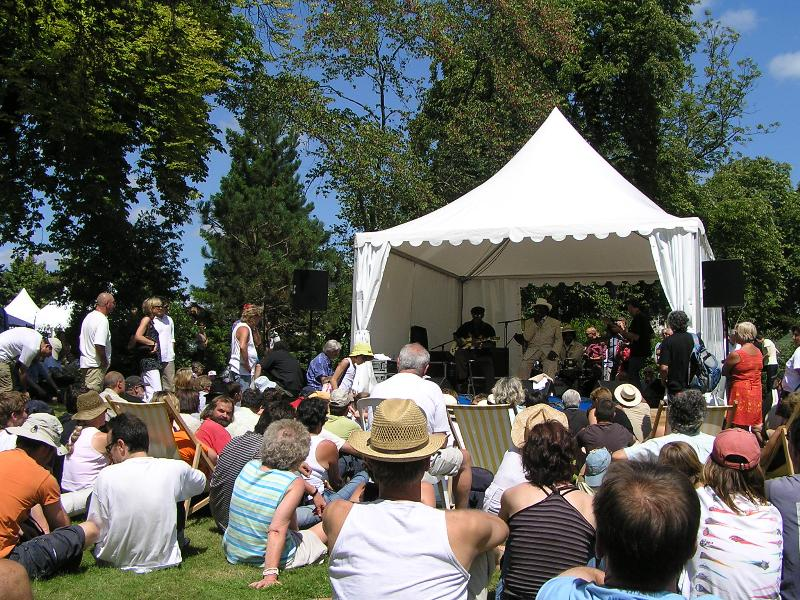 Blues passions 2007, Cognac, France. Big George Brock